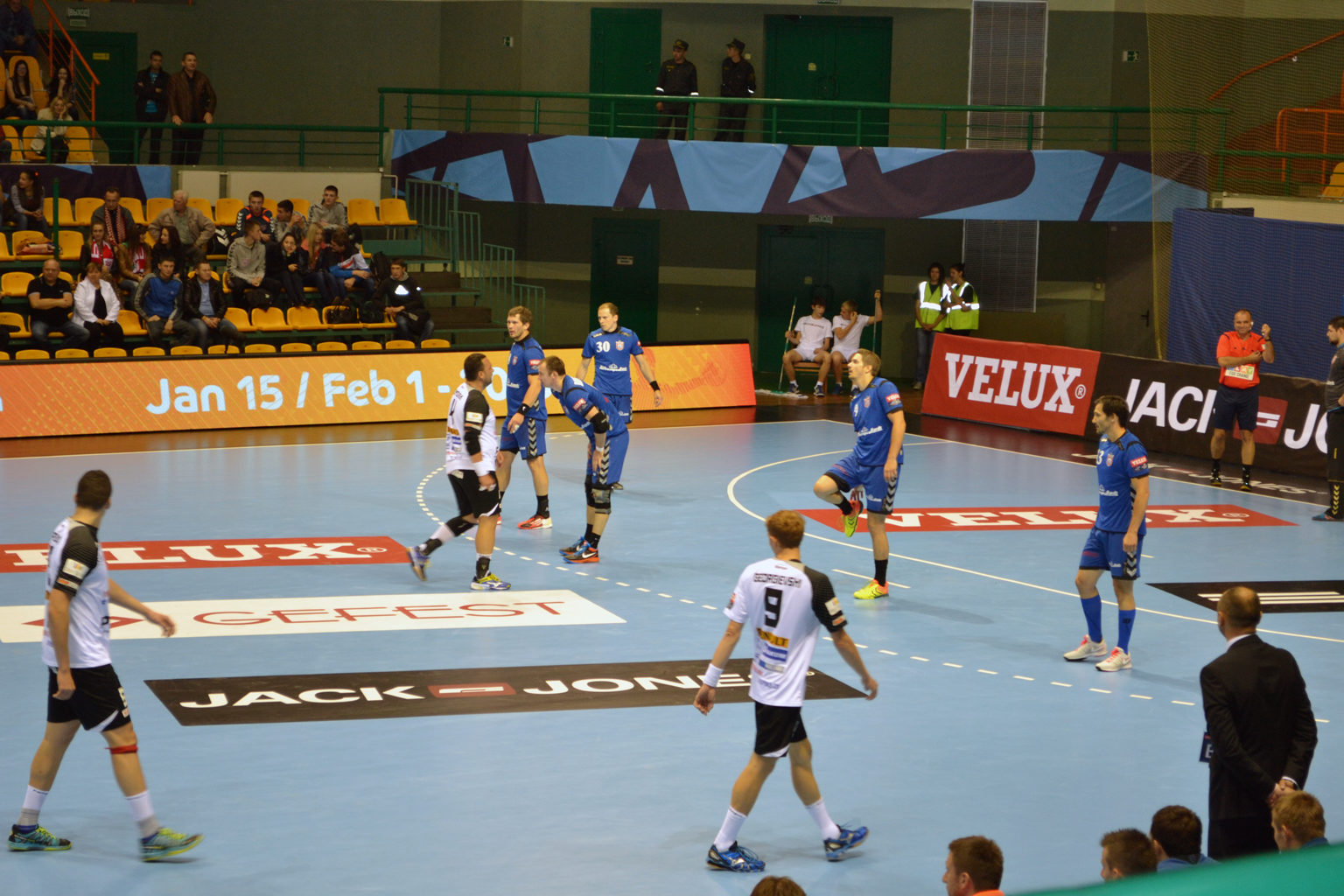 Беларуская (тарашкевіца): Матч Лігі чэмпіёнаў паміж берасьцейскім клюбам «БГК імя Мяшкова» і «Мэталюргам» са Скоп’е.